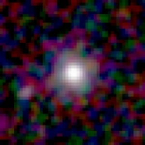 Galaxy NGC 77